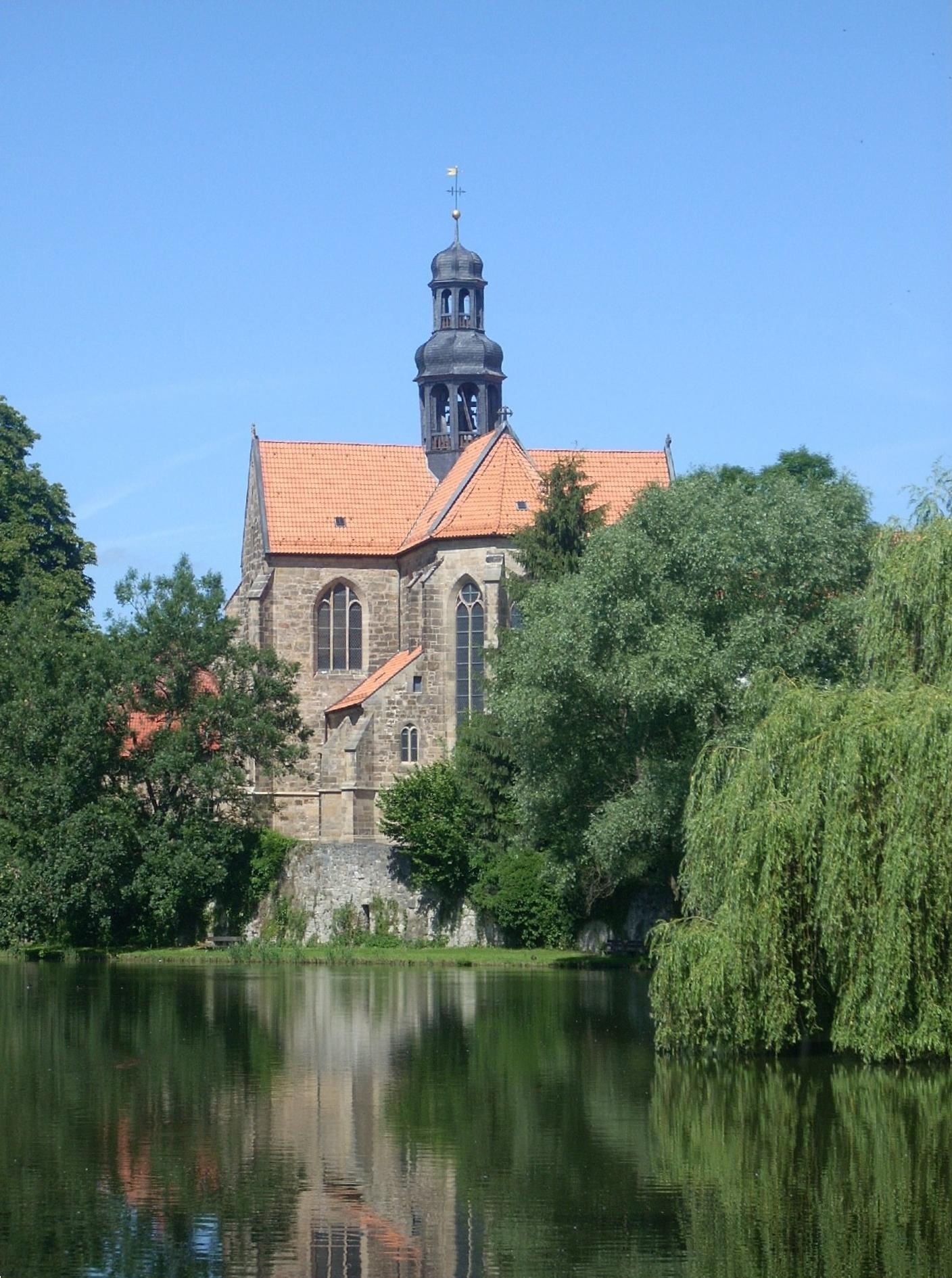 Kloster Marienrode, Klosterteich und Kirche von Osten